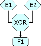 EPC XOR merge